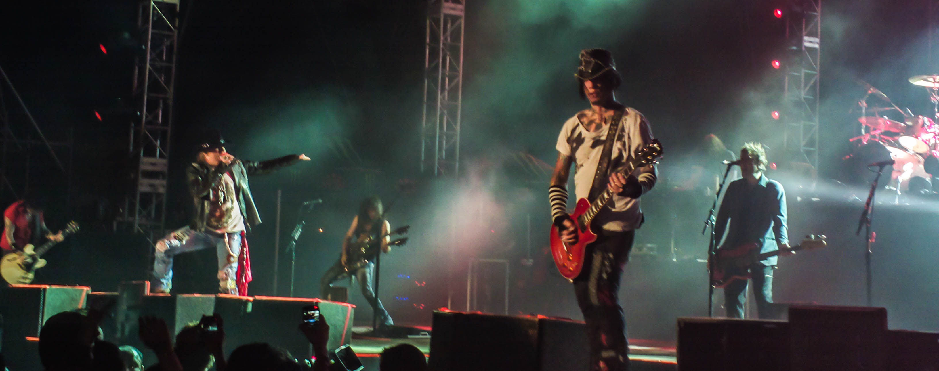 2012-12-07-0068.jpg